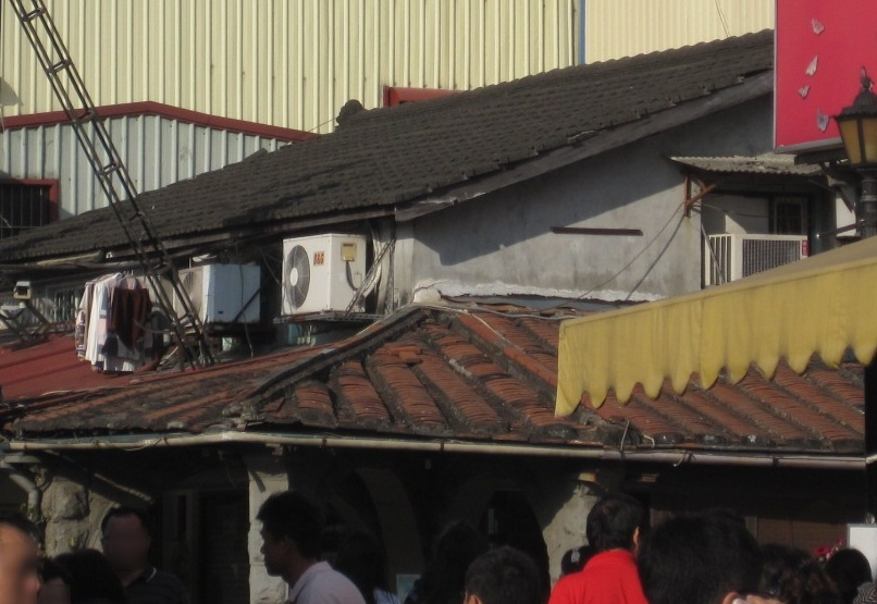 旗山亭仔腳外觀